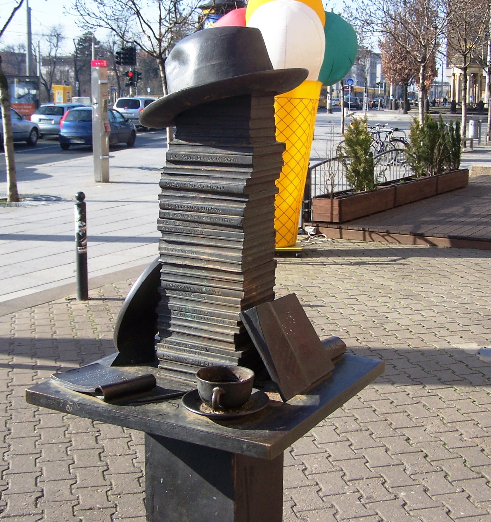 Erich-Kästner-Denkmal von Eike-Kuntsche in Dresden, Albertplatz